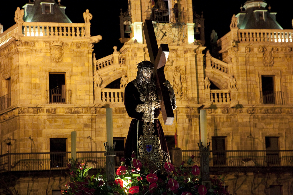 Jesús Nazareno en la procesión del Silencio, en la Semana Santa de Astorga (León, España).